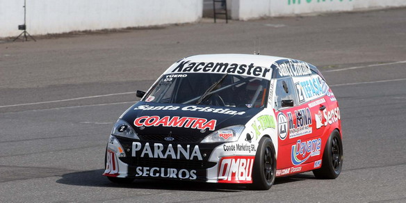 Fotografía del Ford Facus de Turismo Nacional de Esteban Tuero